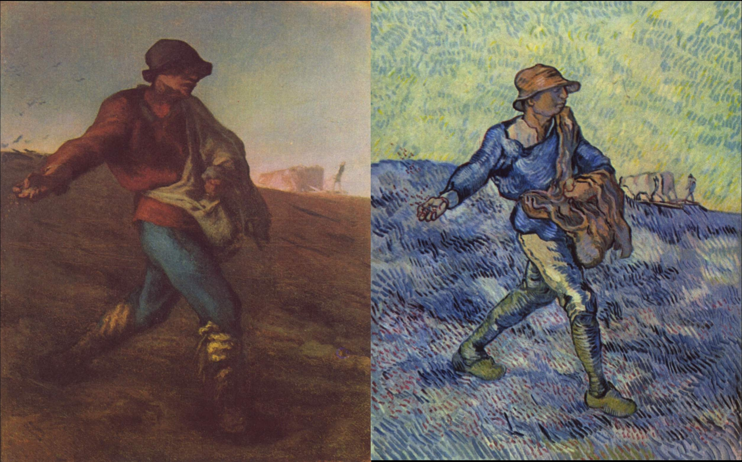 exemple d'un copie d'oeuvre de Van Gogh